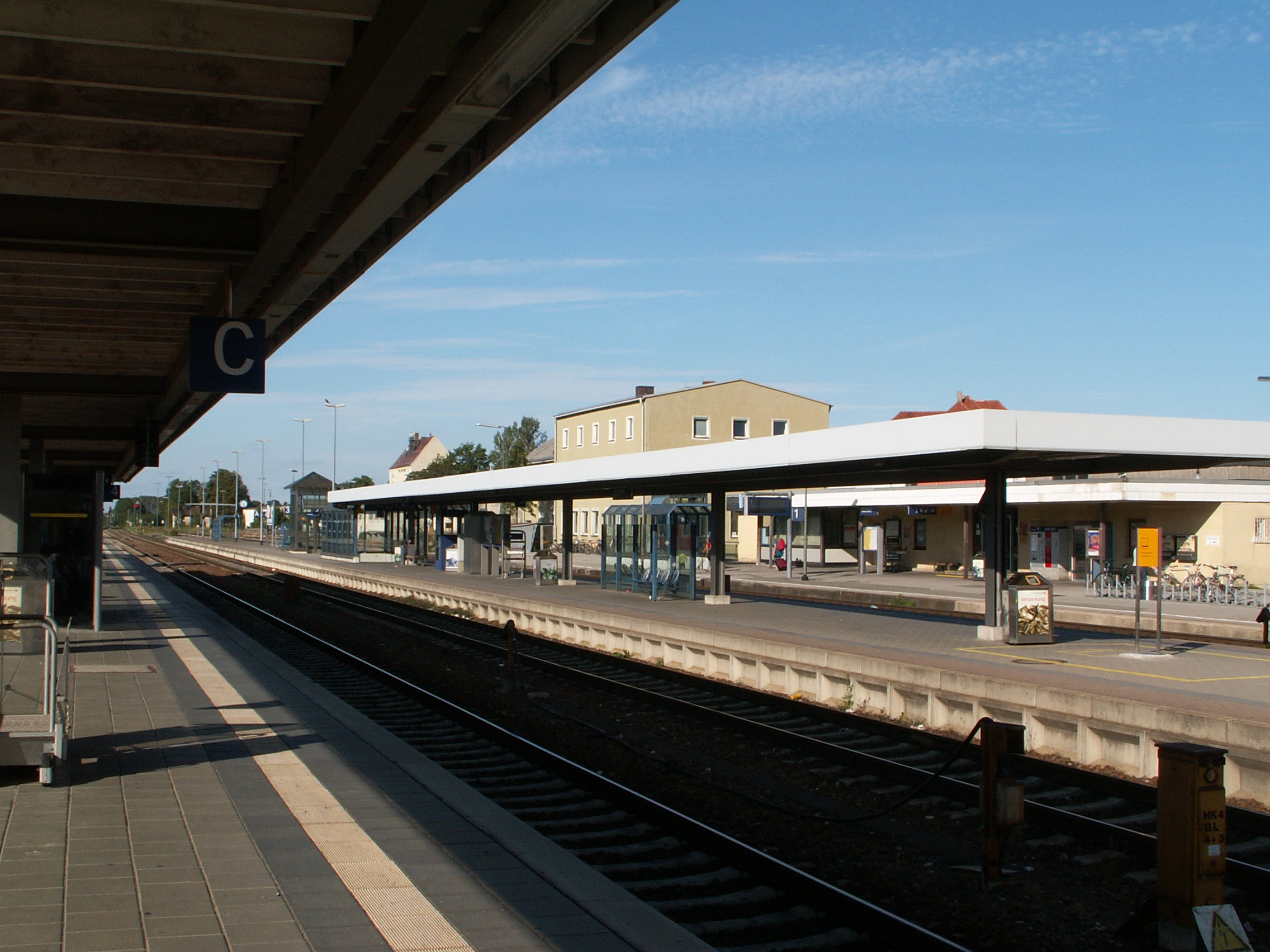 Bahnhof Buchloe im Jahr 2008 - 2016 wurden Teile der im Bild sichtbaren Gebäude saniert bzw. abgerissen und durch Neubauten ersetzt